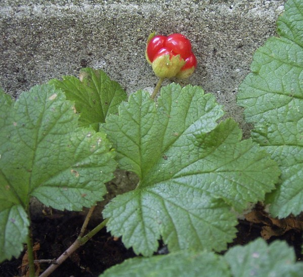 Rubus chamaemorus avec jeune fruit. Photograph: Denis Barthel : image sous licence Licence de documentation libre GNU (GFDL) 2004